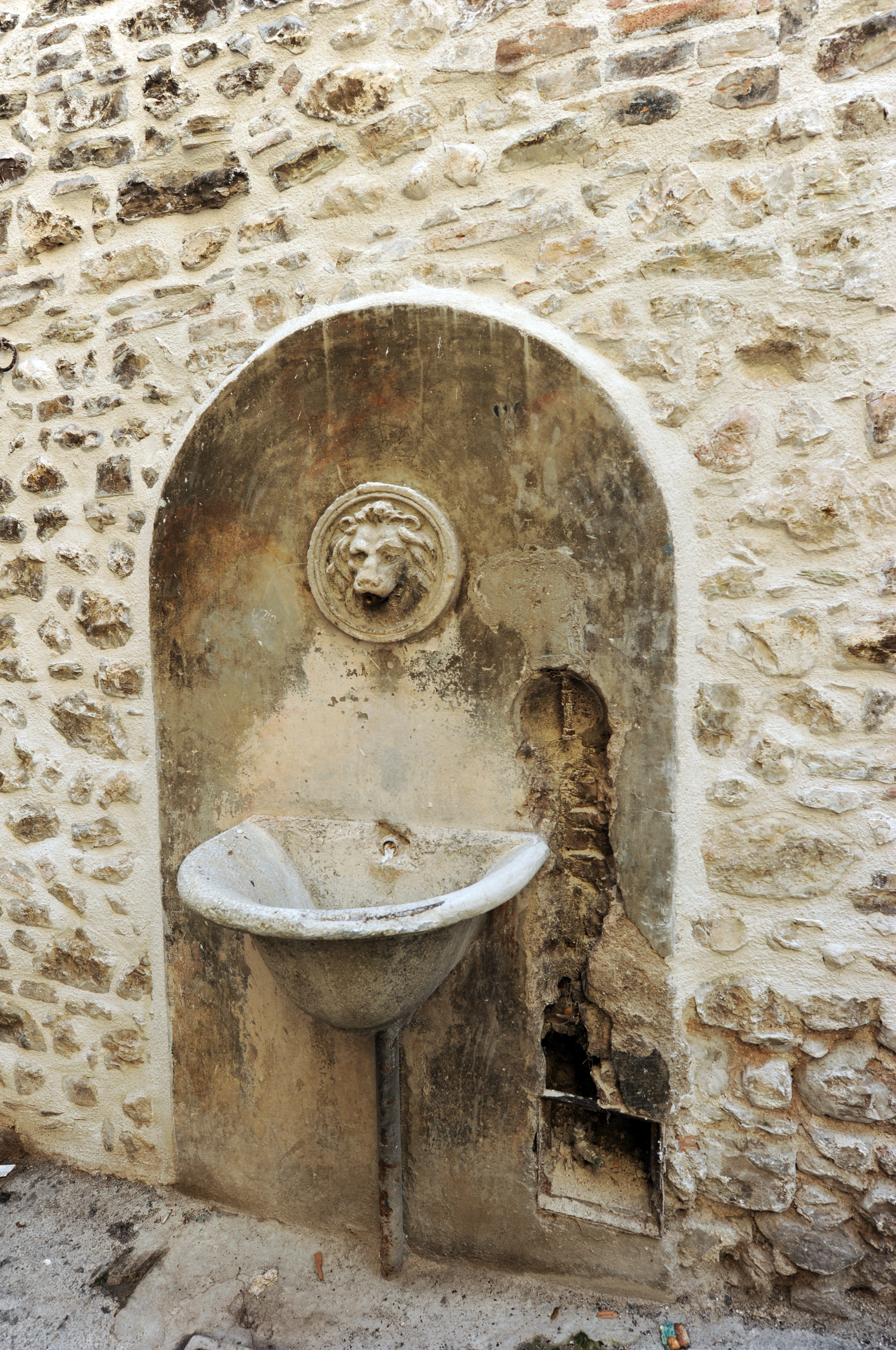 Fontanella di Vicolo del Pozzo Sicuramente in quella zona tra Piazza Carducci e Via Campo dei Fiori c'era dell'acqua fin dai tempi più antichi. Tanto da darle il nome di Vicolo del Pozzo. Non poteva mancare una fontanella, con la classica bocca di leone e la vasca monolitica.